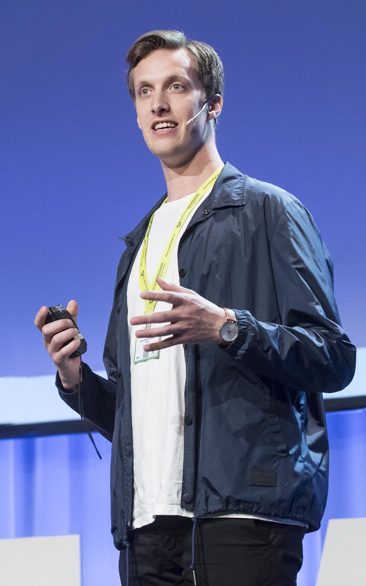 YouTubestjernenes medieverden med Herman Dahl, Markus SannesModerator Jonas Lihaug Fredriksen og Henrik Hildre